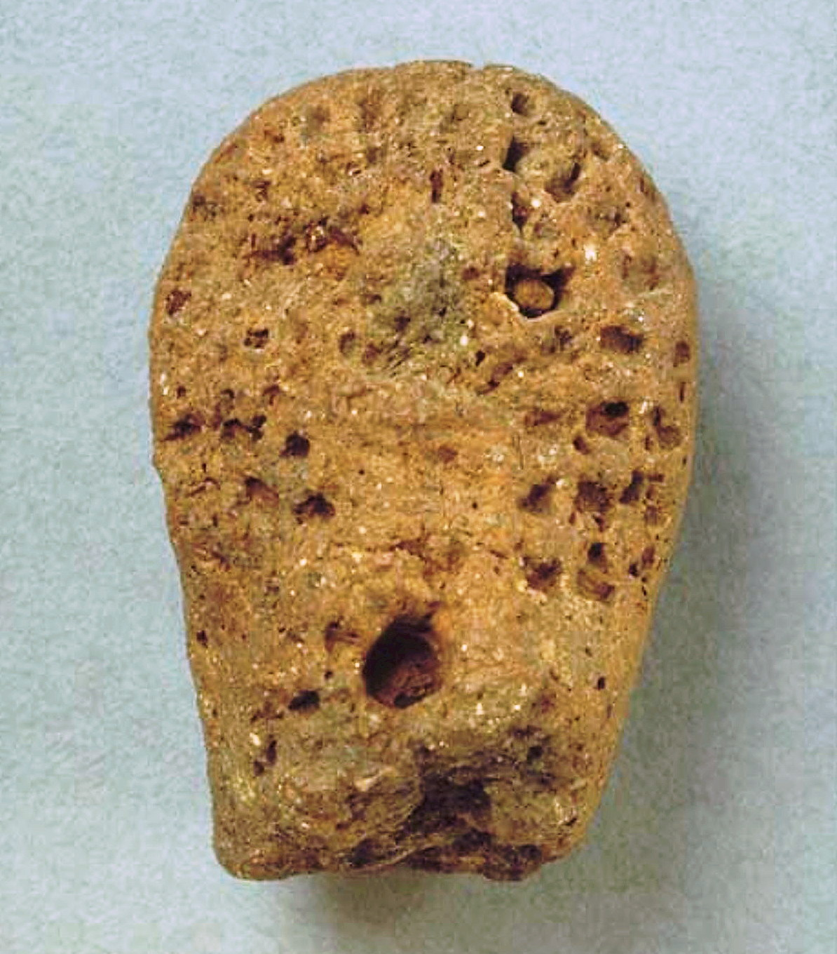 Huvud till en människofigur av keramik, kallat "Masmogubben". 3299 f.Kr. - 2300 f.Kr. i Masmo, Vårby gård, Huddinge kommun.